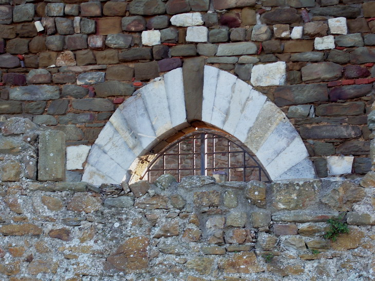 Particolare dell'arco che sovrasta l'originario ingresso alla Rocca aldobrandesca (Rocca Pisana) di Scarlino